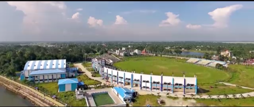 জলপাইগুড়ি স্টেডিয়াম